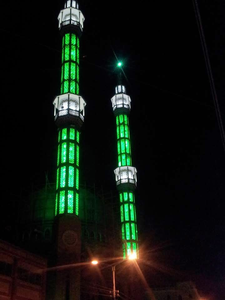 الصورة هنا ألتقطت ليلاََ وتظهر المئذنتين مُنارة